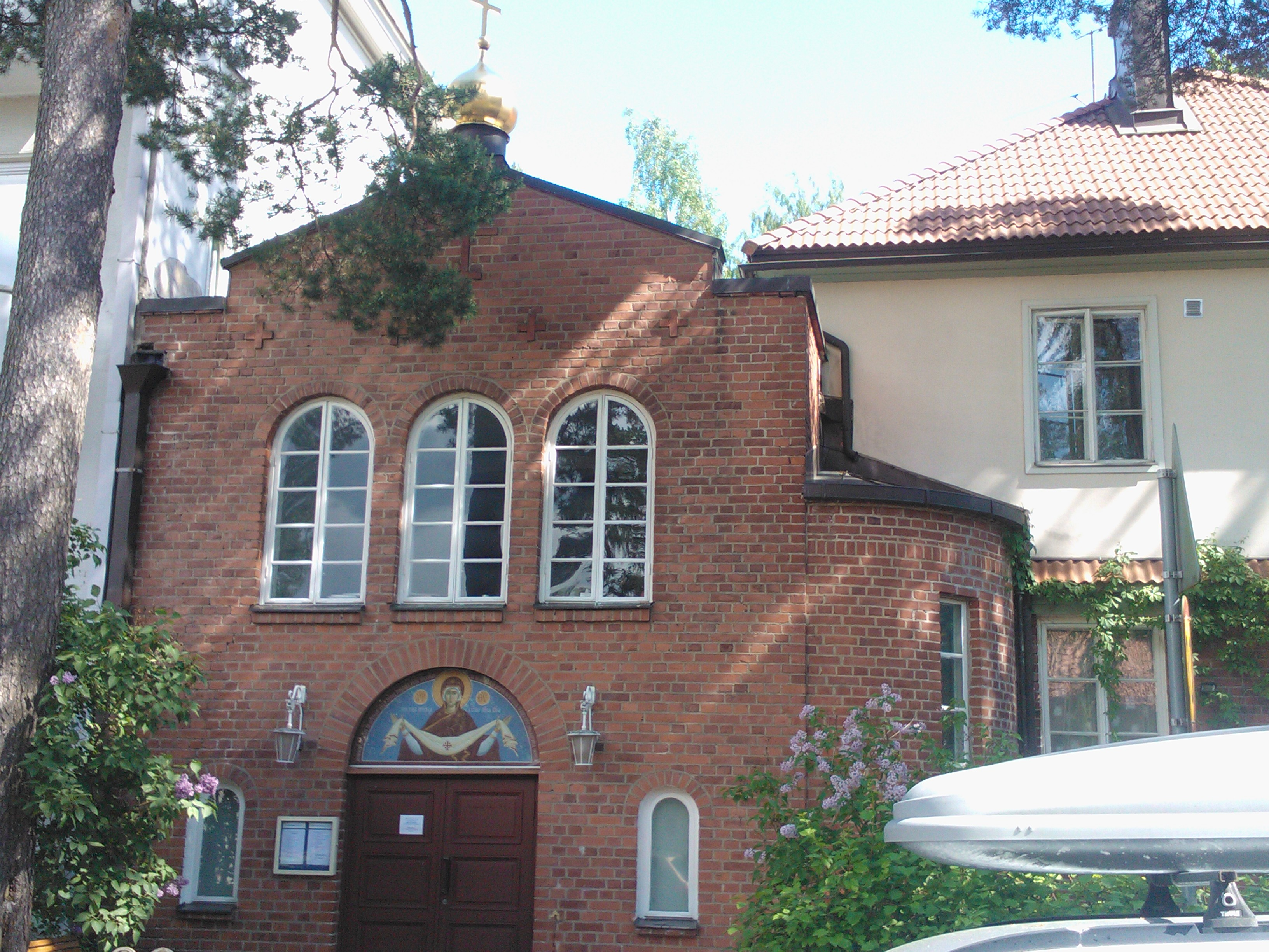 Церковь Покрова Божией Матери в Хельсинки